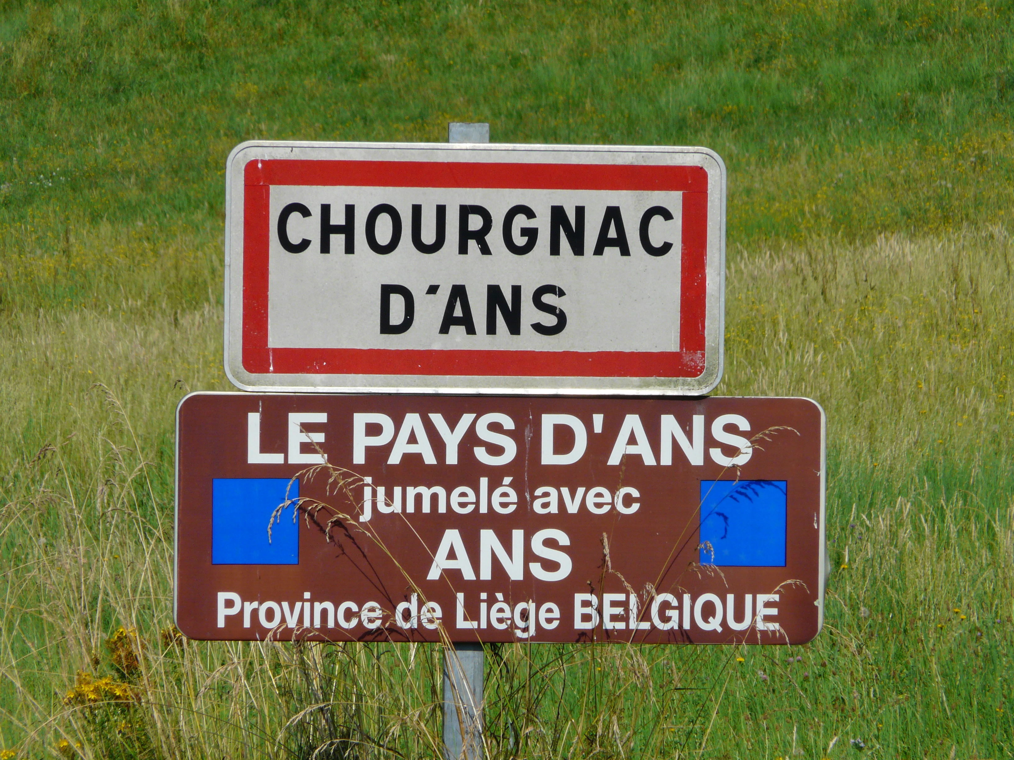 Panneau de jumelage de Chourgnac, Dordogne, France.